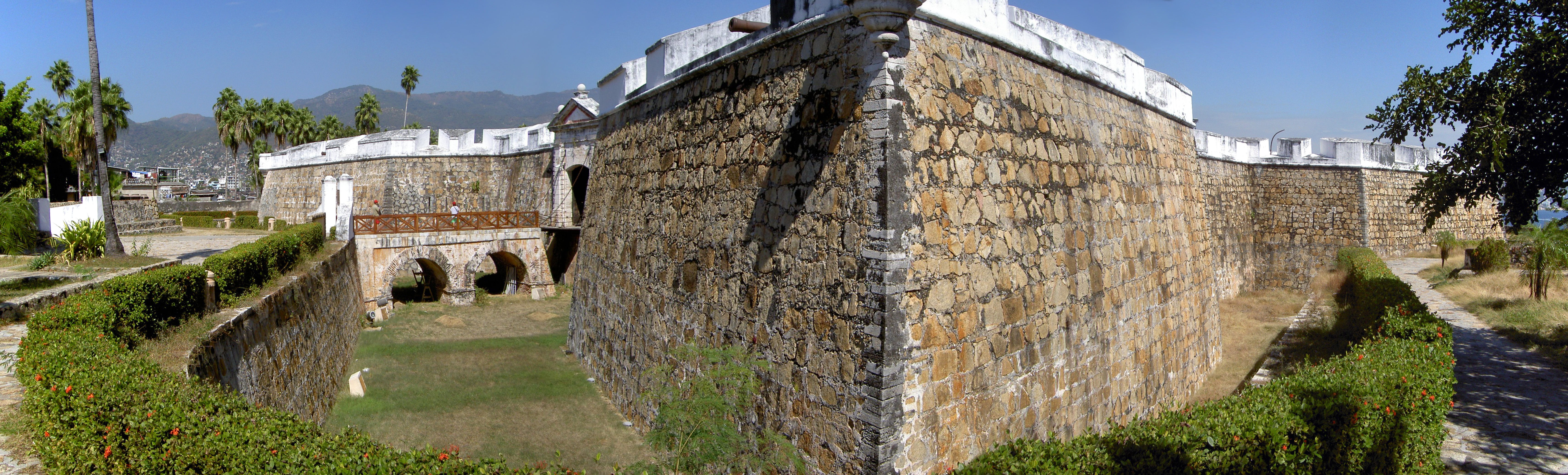 El Fuerte de San Diego en Acapulco, Guerrero, México. Originalmente fue construido entre 1615 y 1617, pero un terremoto lo derribó en 1776 y es hasta 1783 que se reconstruye el actual.